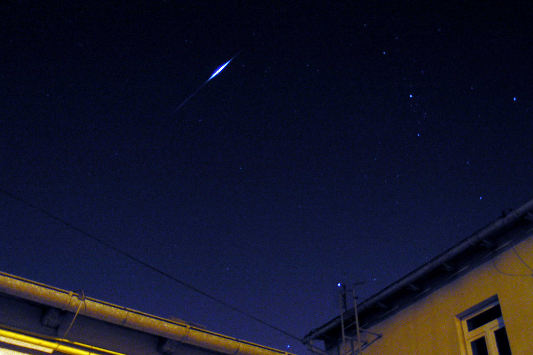 Flara Iridium72